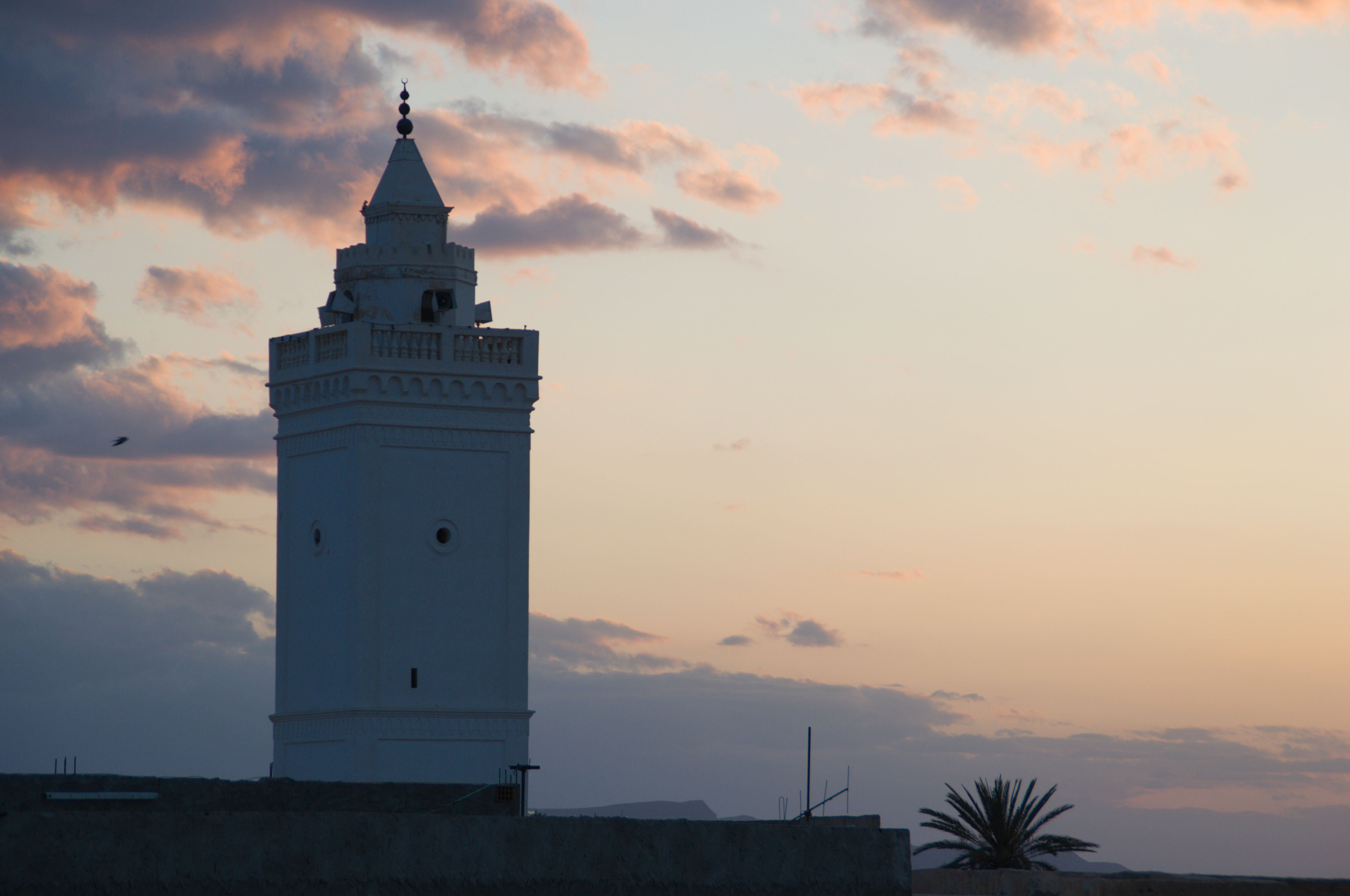 Minaret de la grande mosquée de Gafsa au coucher de soleil.